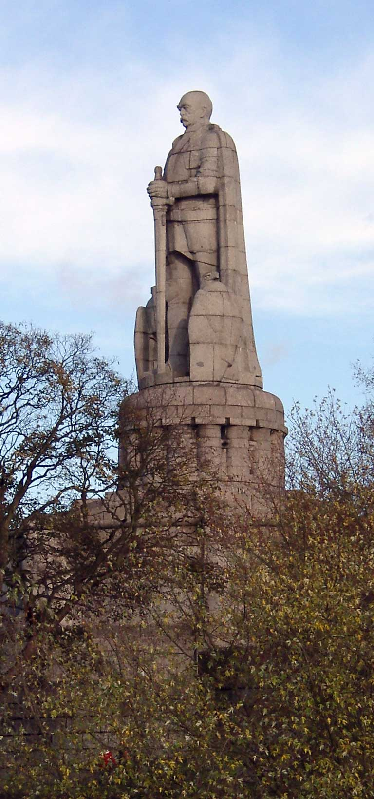 Das Bismarck Denkmal im alten Elbpark in Hamburg (Landungsbrücken).